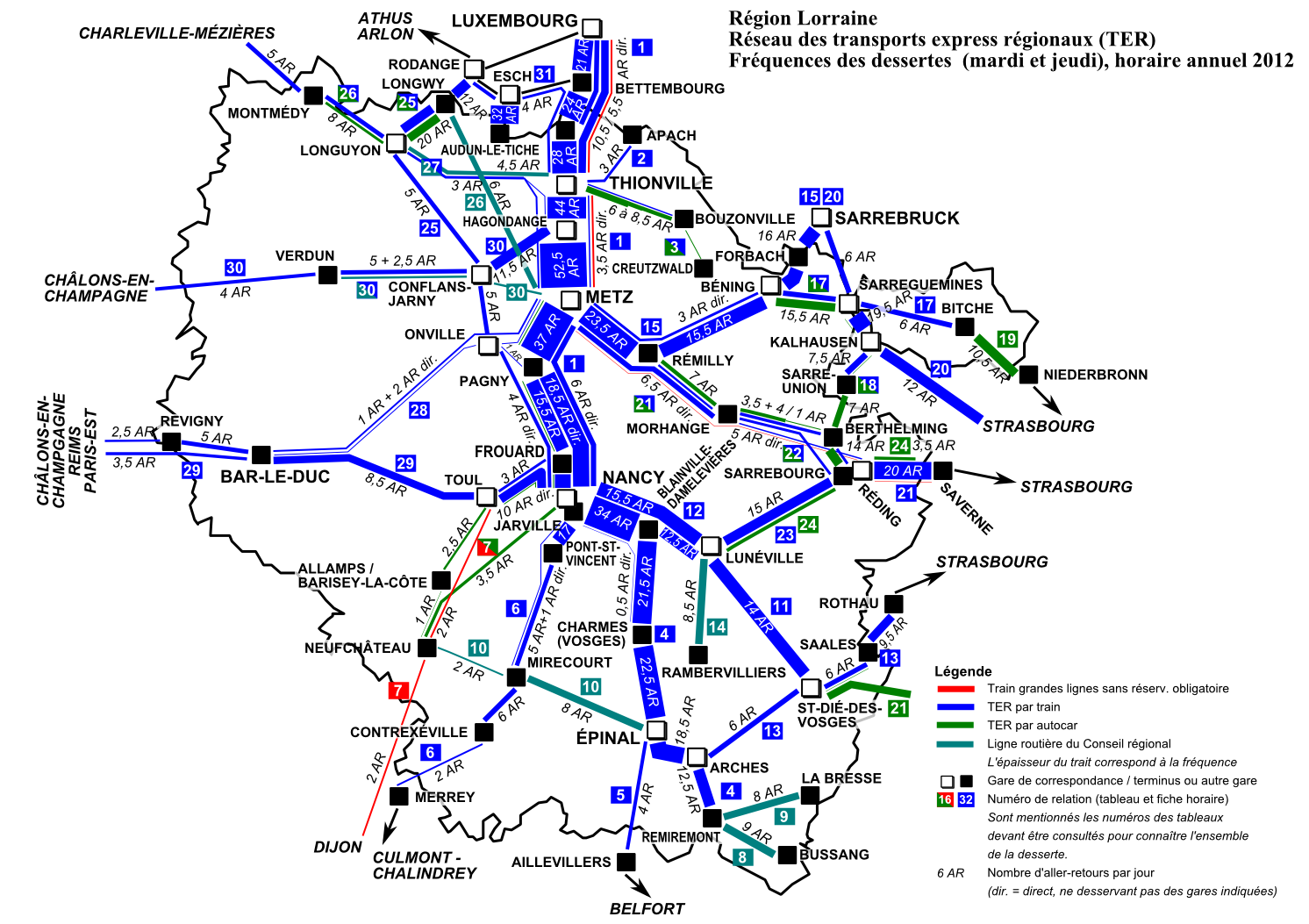 TER Lorraine, fréquence de la desserte les jours-type de pleine semaine (mardi et jeudi), horaire annuel 2012.